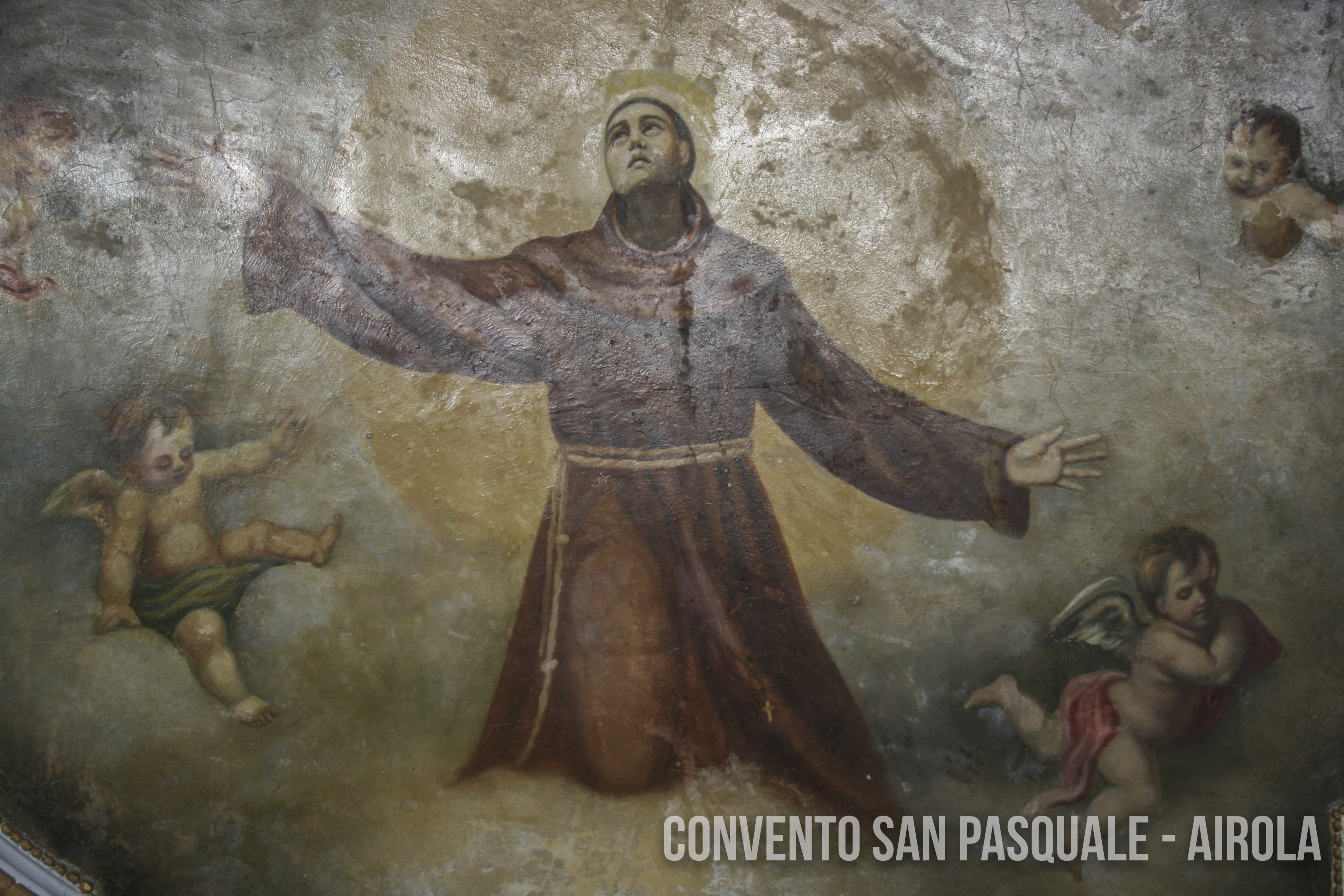 Chiesa SS. Concezione - Airola (BN)